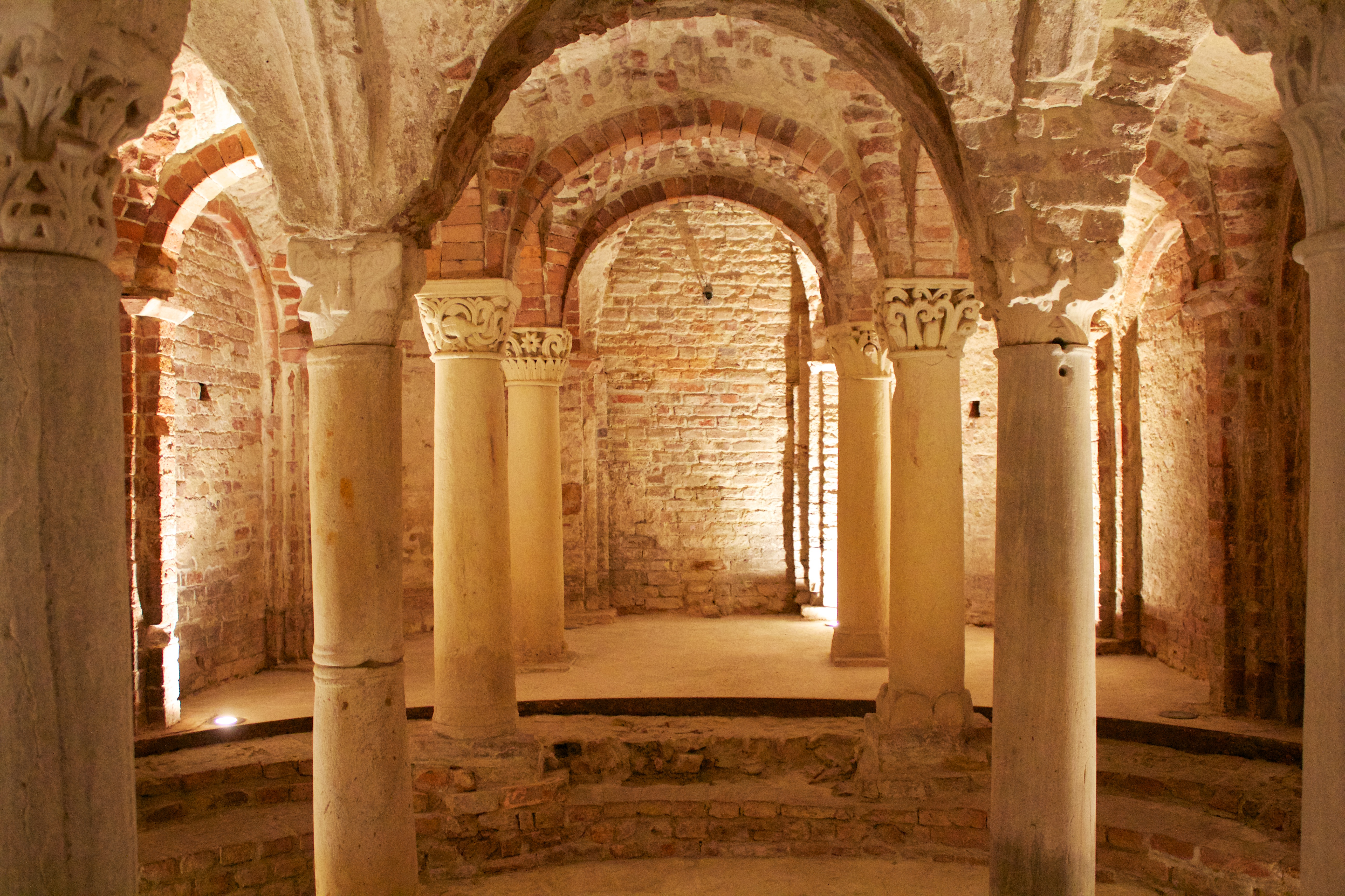 Cripta e Museo di Sant’Anastasio, Asti This is a photo of a monument which is part of cultural heritage of Italy.